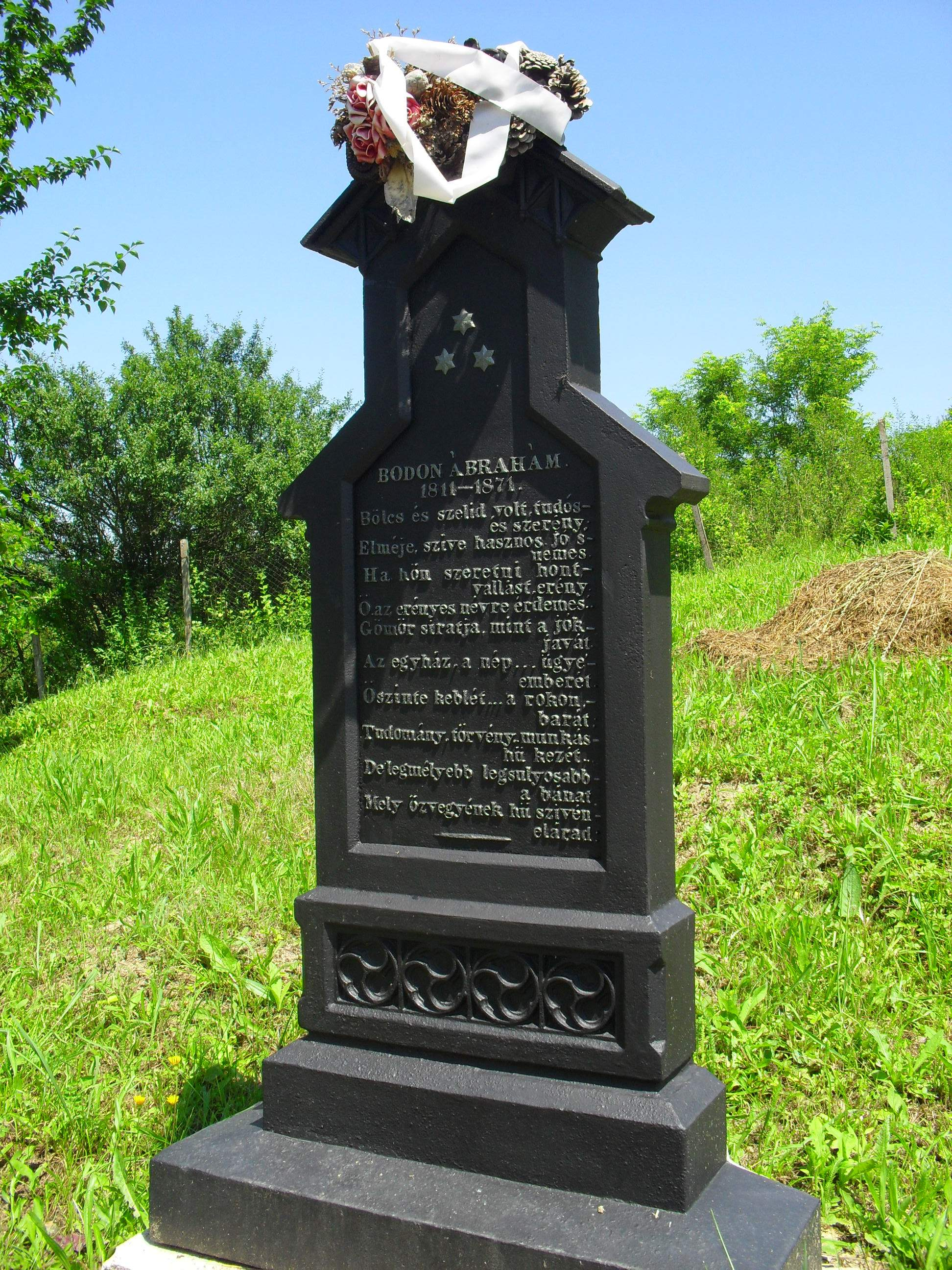 Gömörmihályfalva - Bodon Ábrahám síremléke